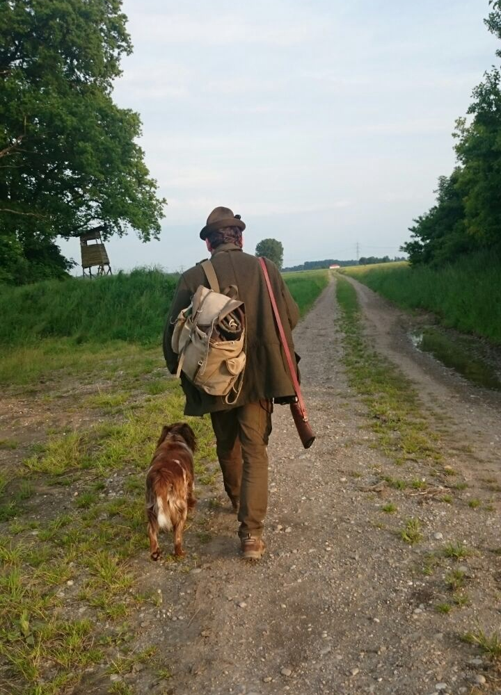 Jäger mit Hund, 86447 Todtenweis Jagd am Naturdenkmal Sander Heide